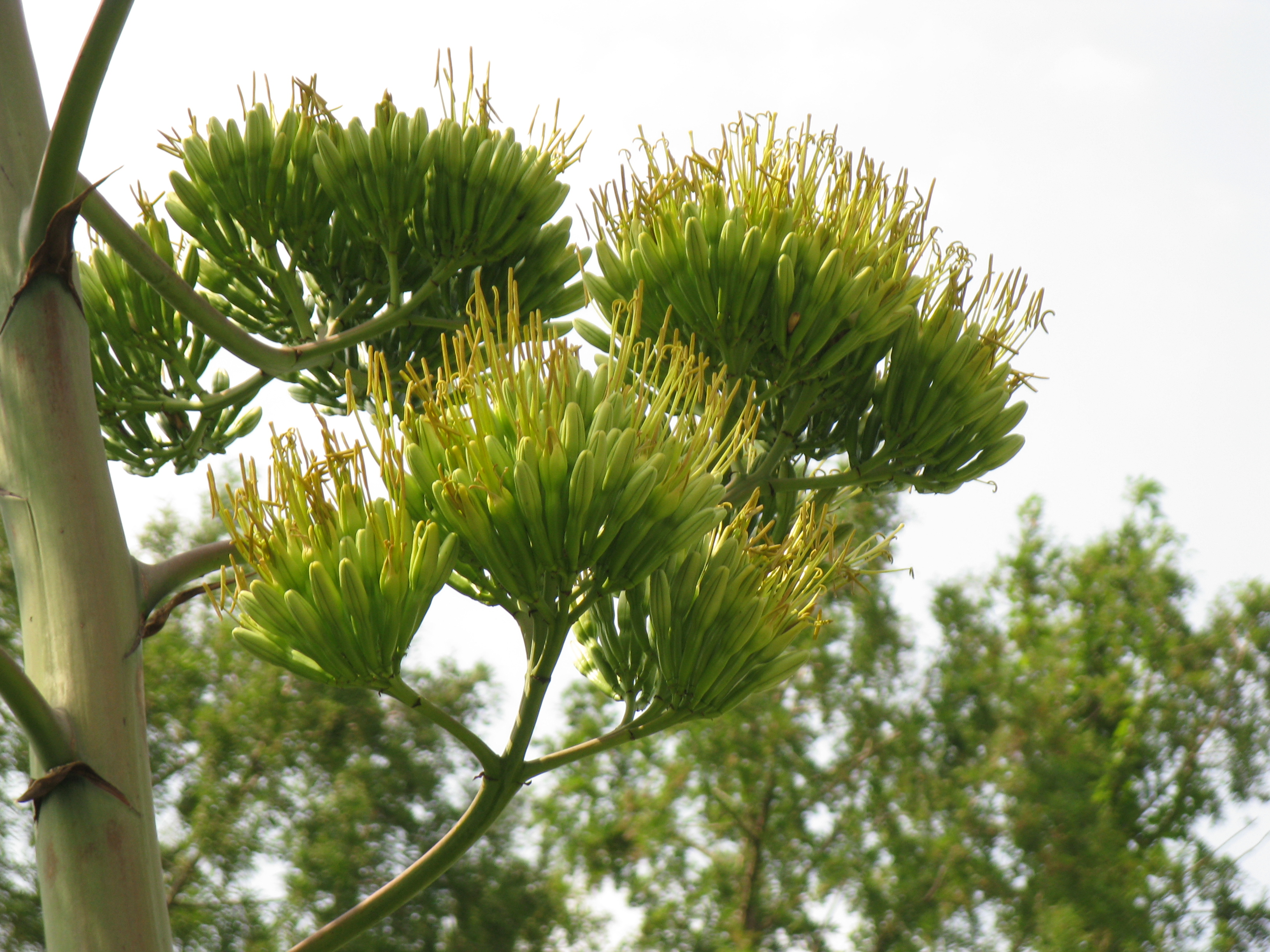 Agave americana